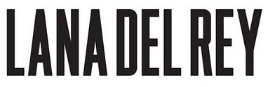 Logo di Lana Del Rey